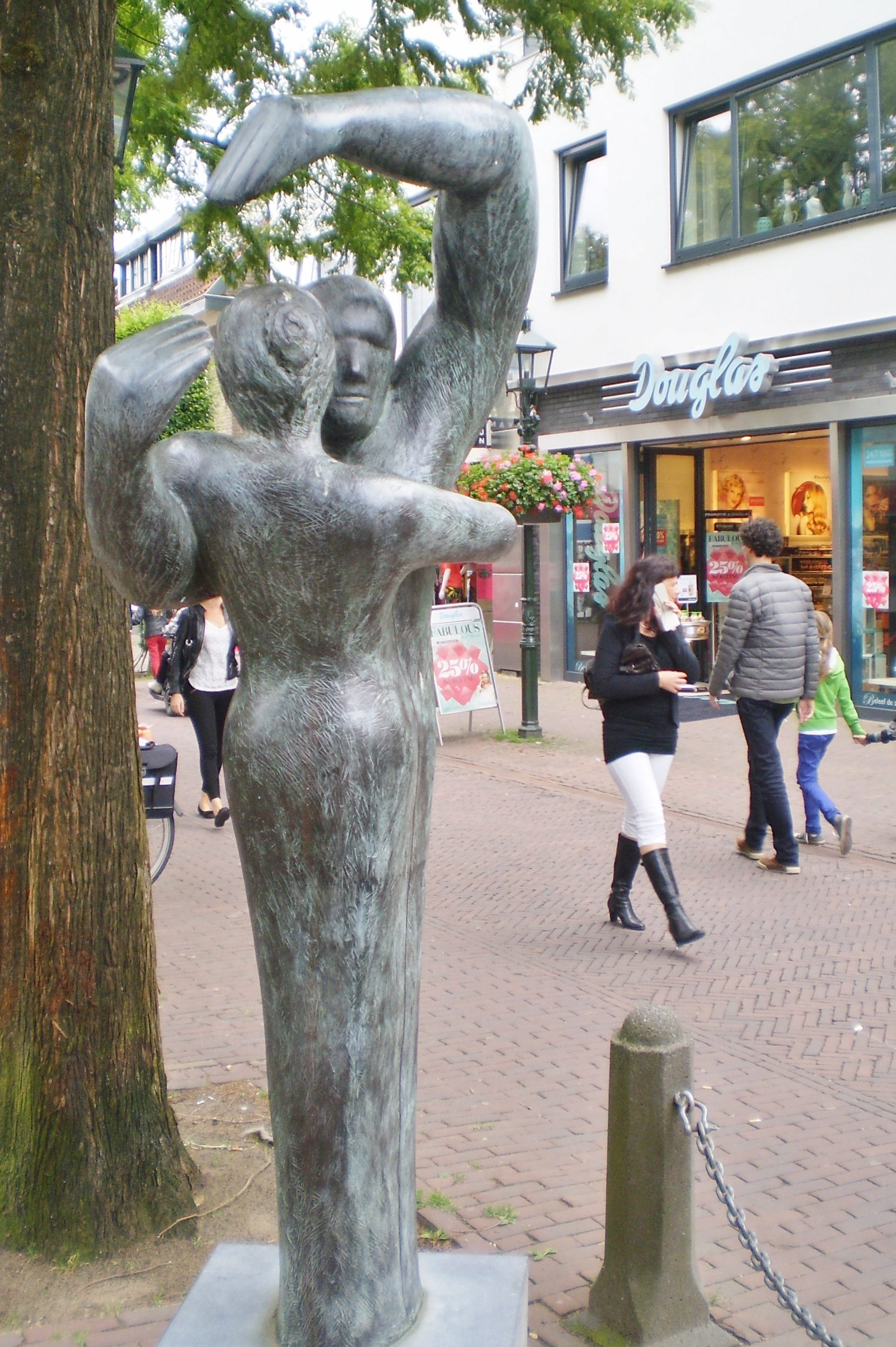 Laanstraat bij de AMRO-bank